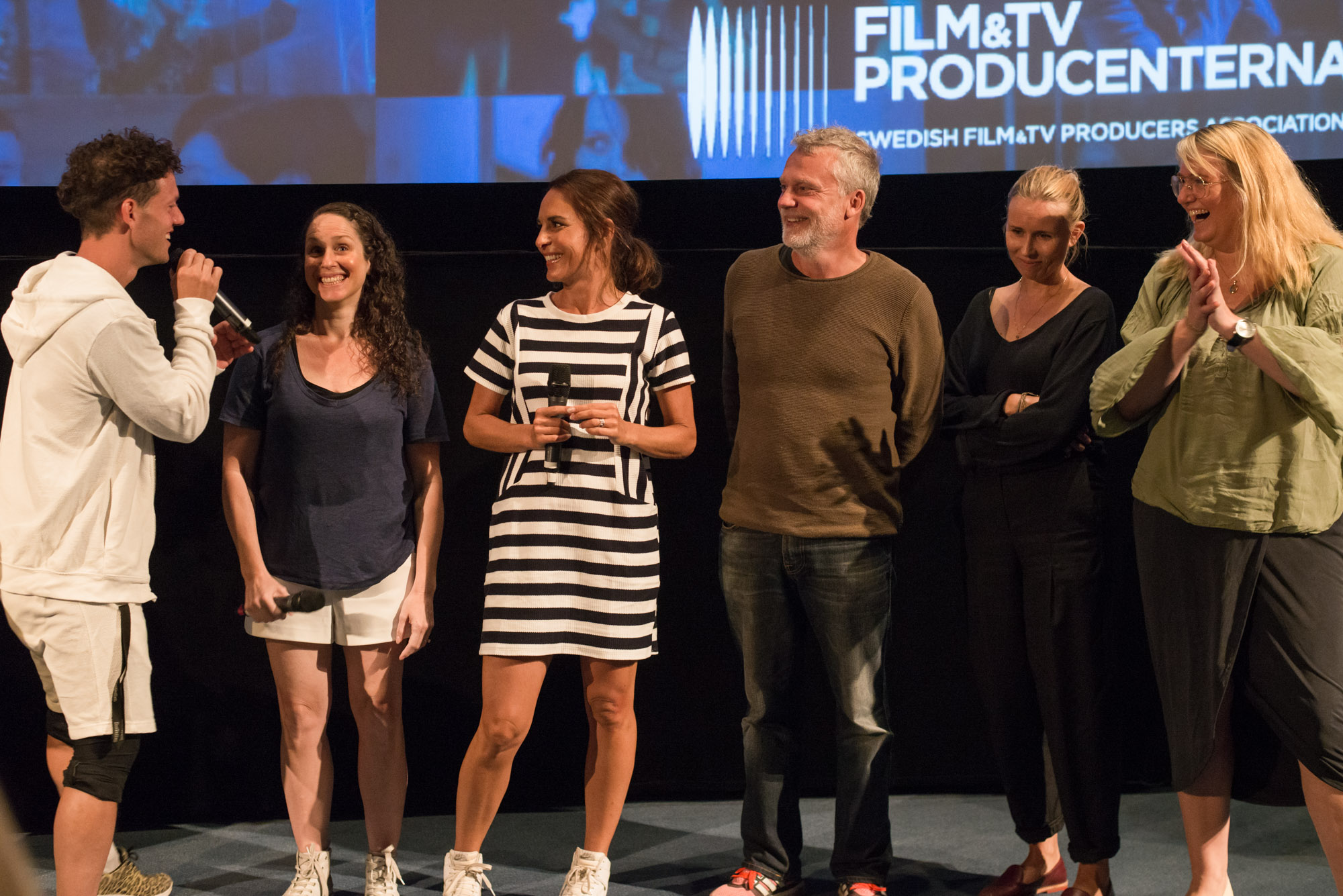 Medarbetare från filmen Lasse-Majas detektivbyrå – Stella Nostra under presentationen av den Svenska filmhösten i Filmhuset i Stockholm den 17 augusti 2015.